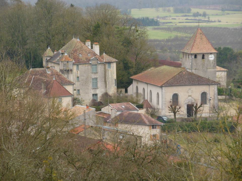 Photographie de l'église Saint-Pierre (XIIIe-XVIIIe s) et du château (XIVe s) de Boucq (54), depuis le Bois de la Reine.